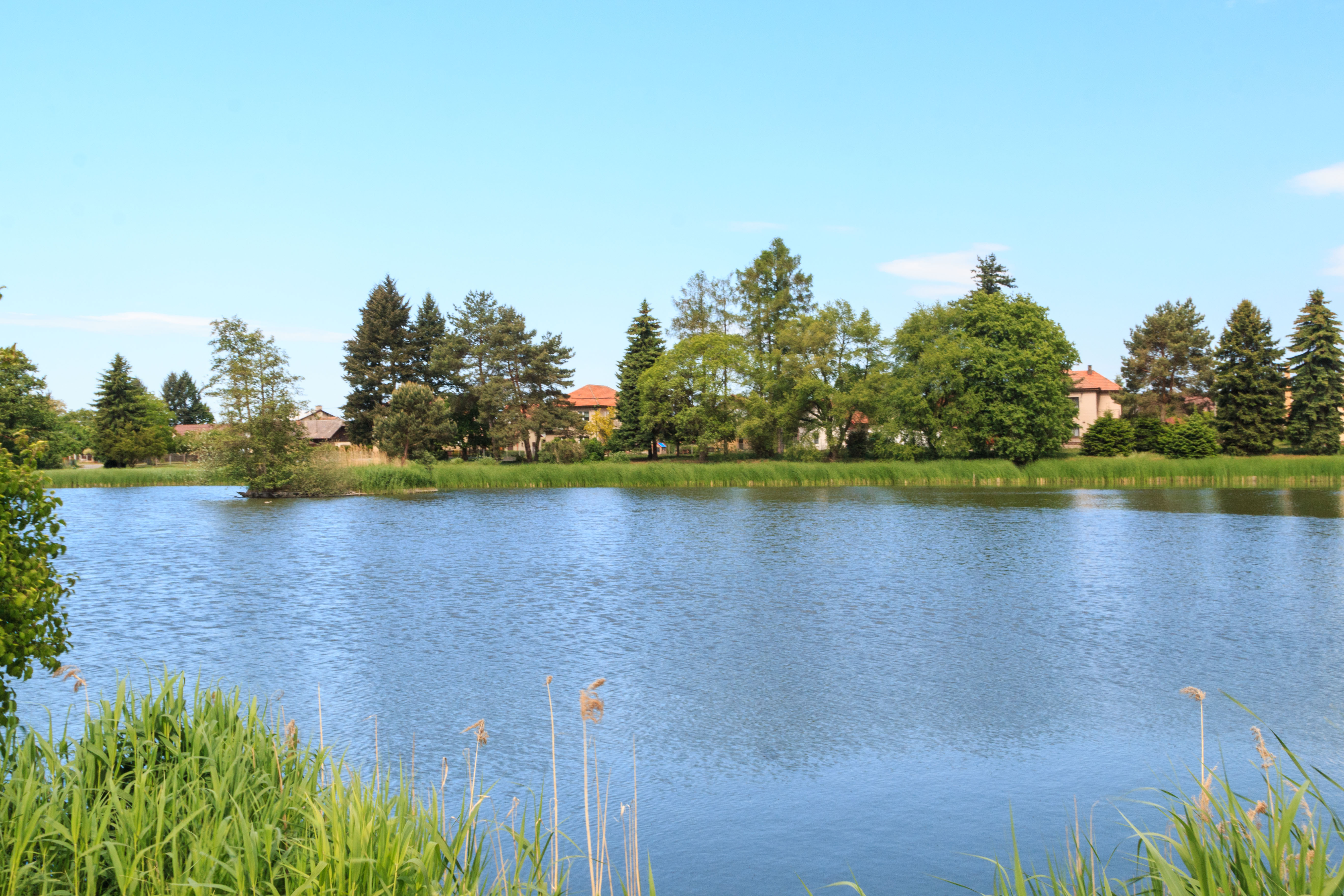 Rokytenský rybník Project: Vodstvo.